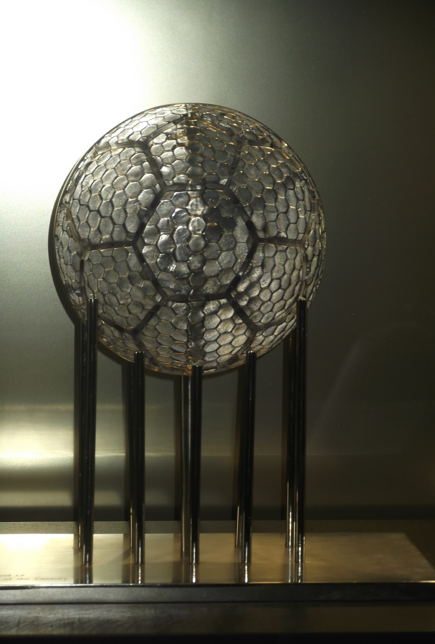 جائزة نادي القرن العشرين التي حصل عليها ريال مدريد الإسباني.